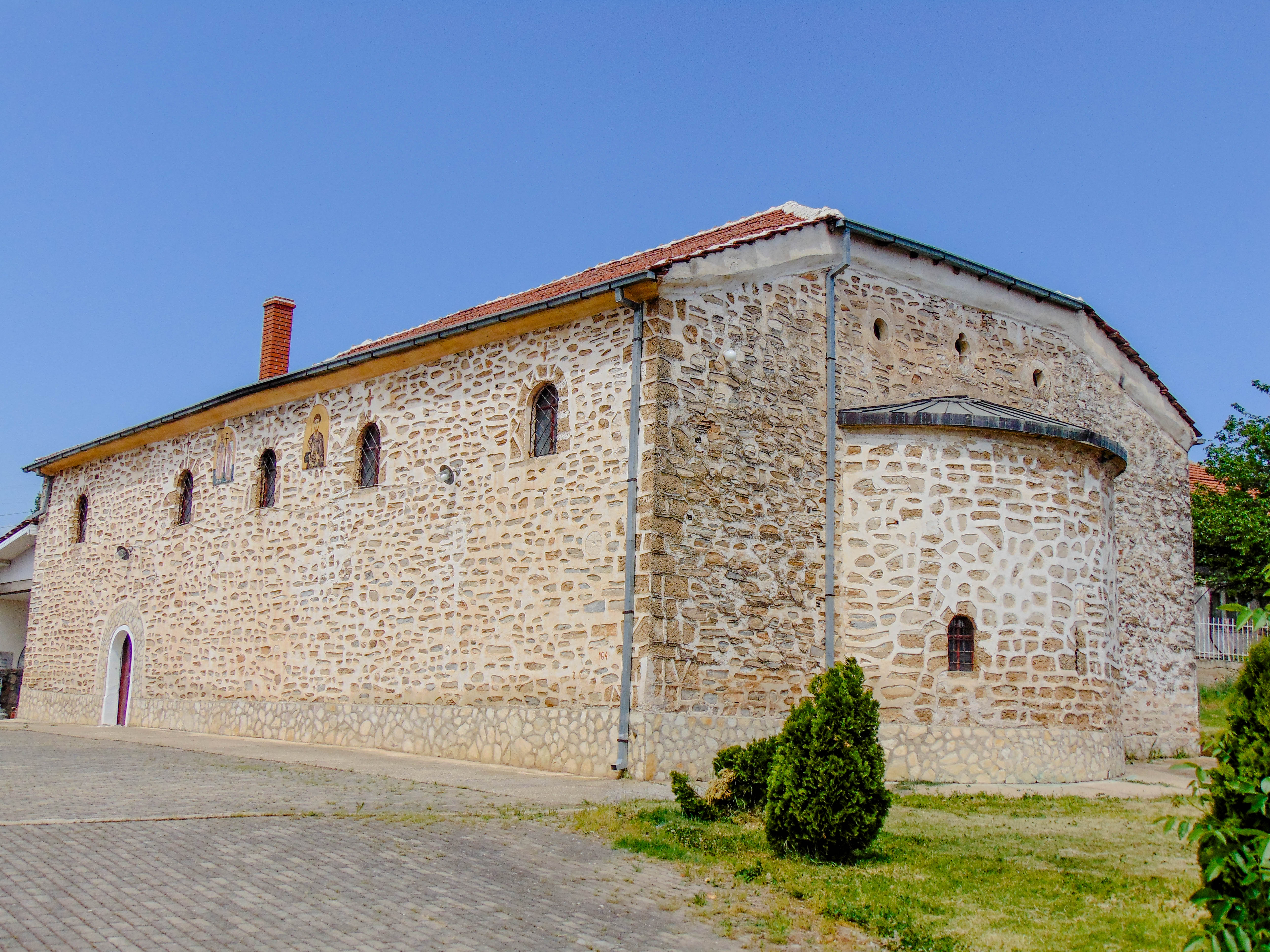 Црква „Св. Константин и Елена“ - Раклиш